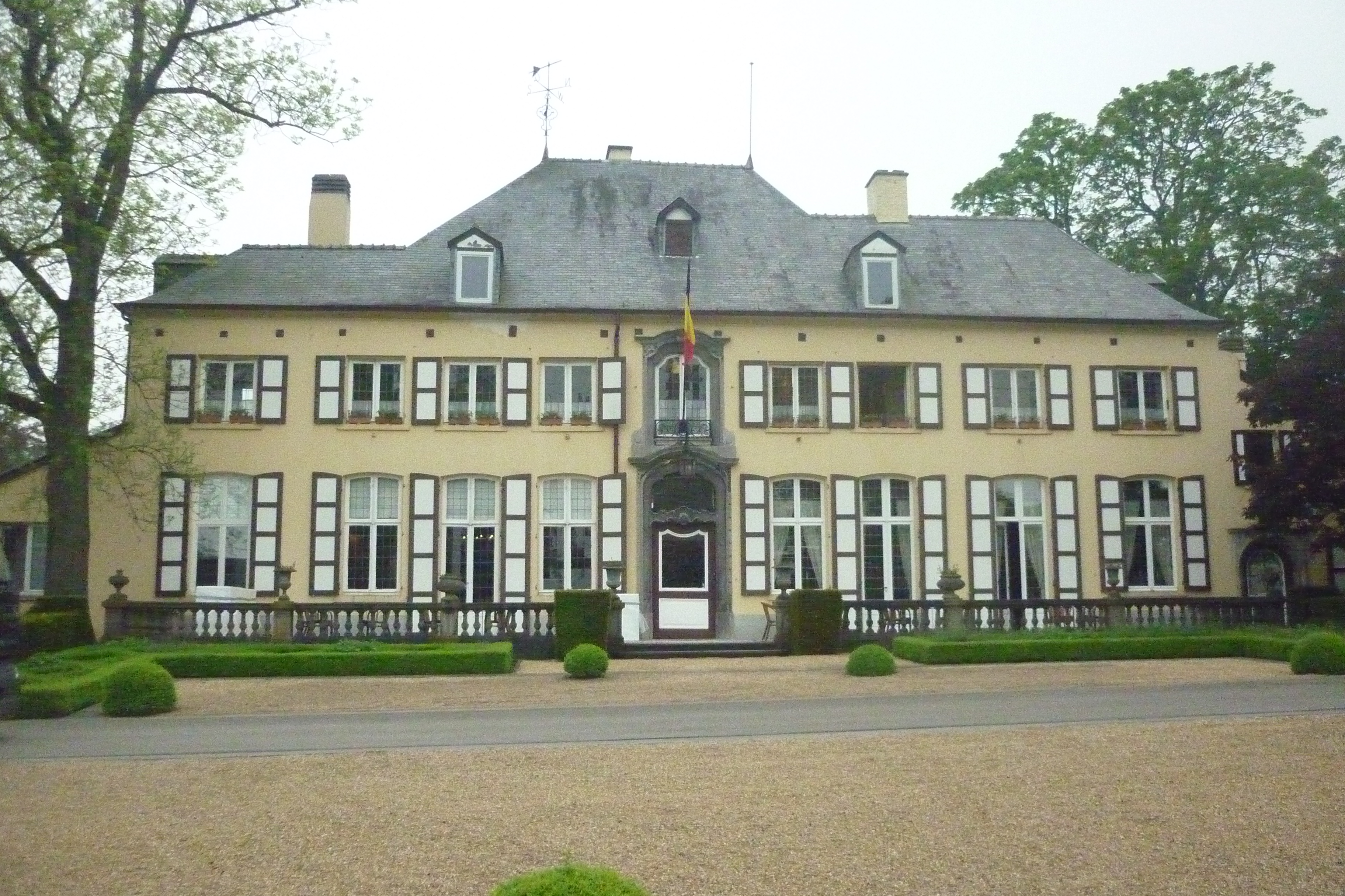 Golfclub Ravestein, België